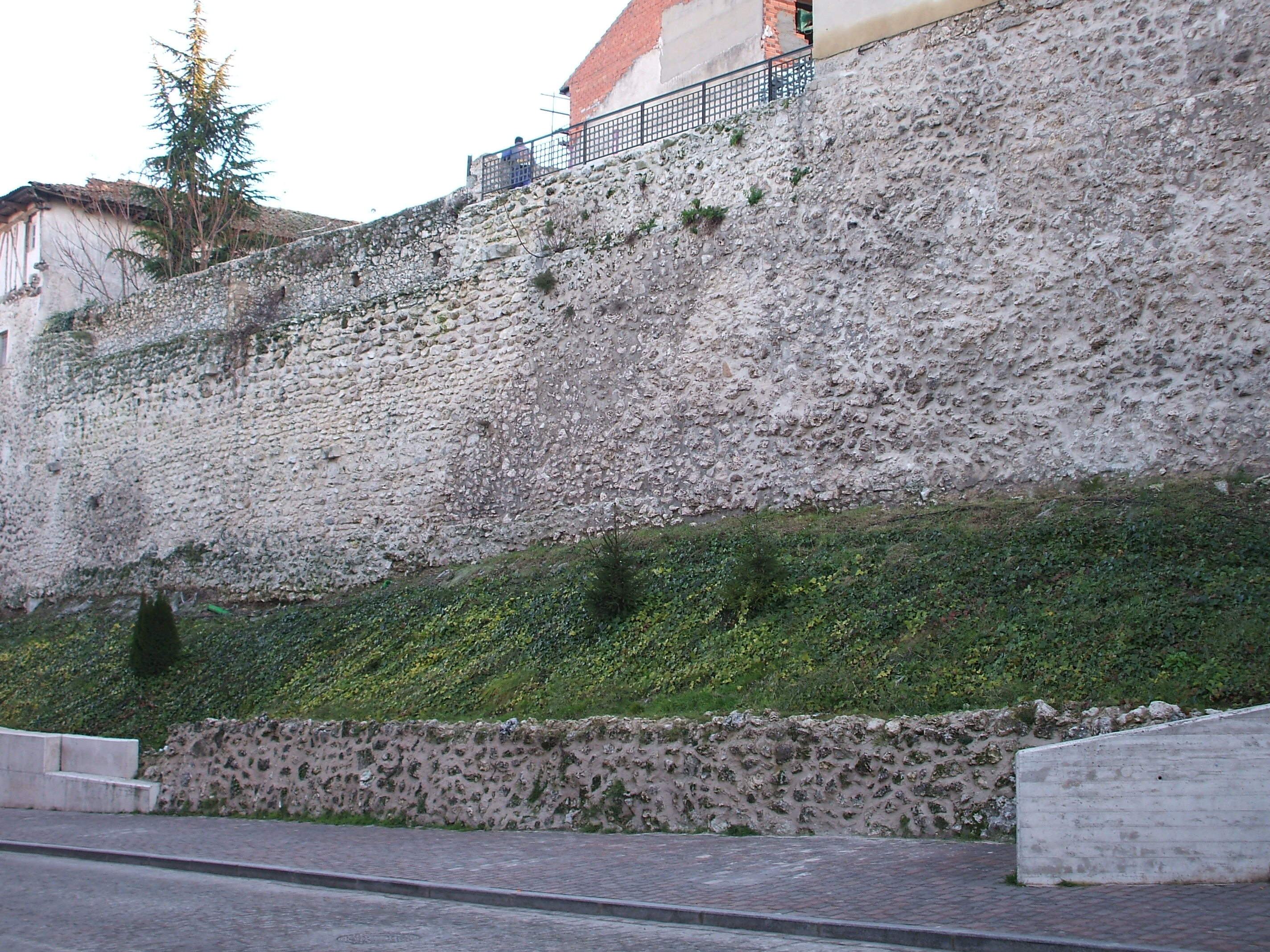 Muralla en la Calle Nueva (Cuéllar)